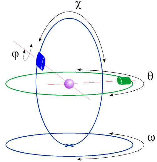 Eine Vierkreis-Anordnung für Röntgendiffraktometer